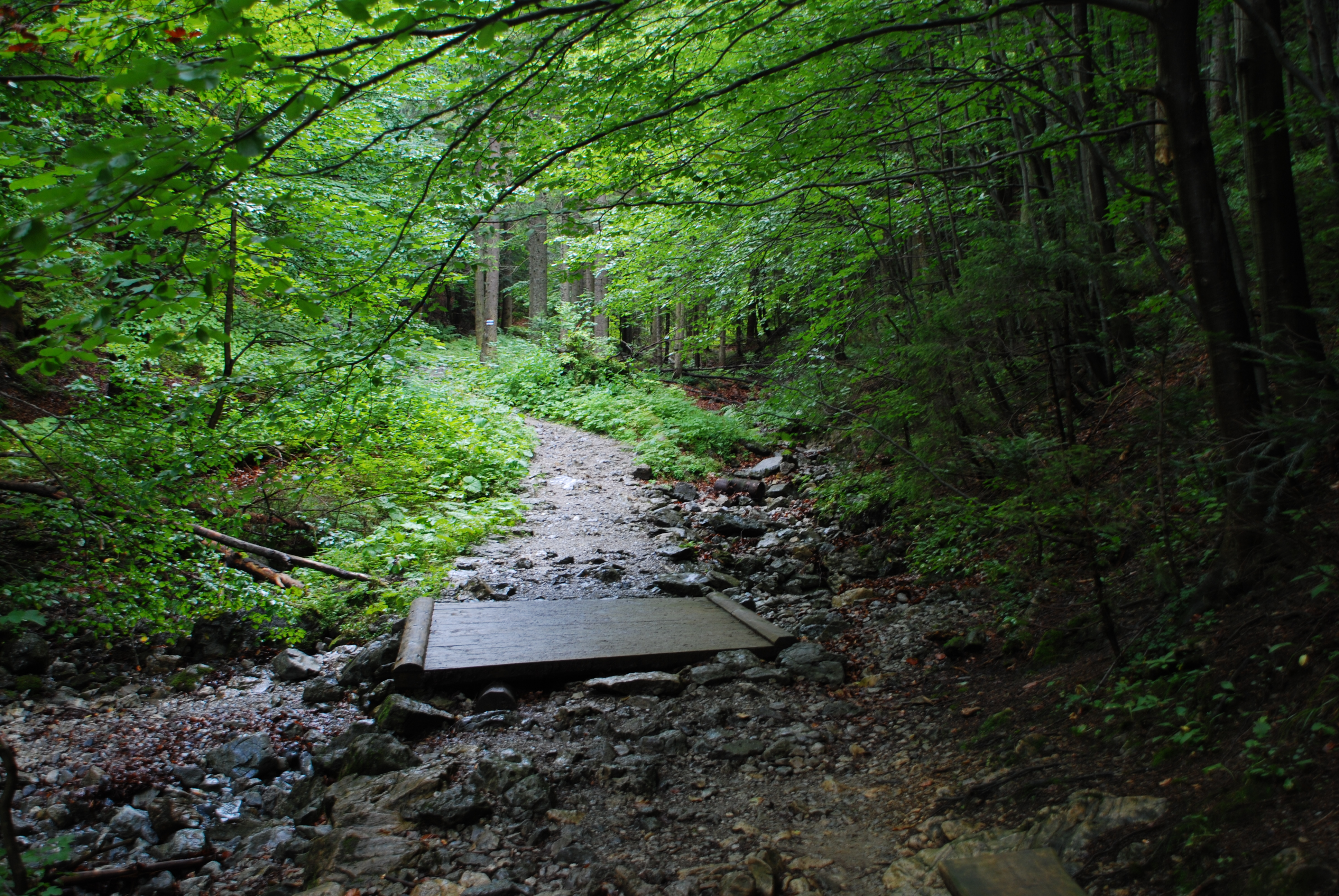 Dolina Ku Dziurze